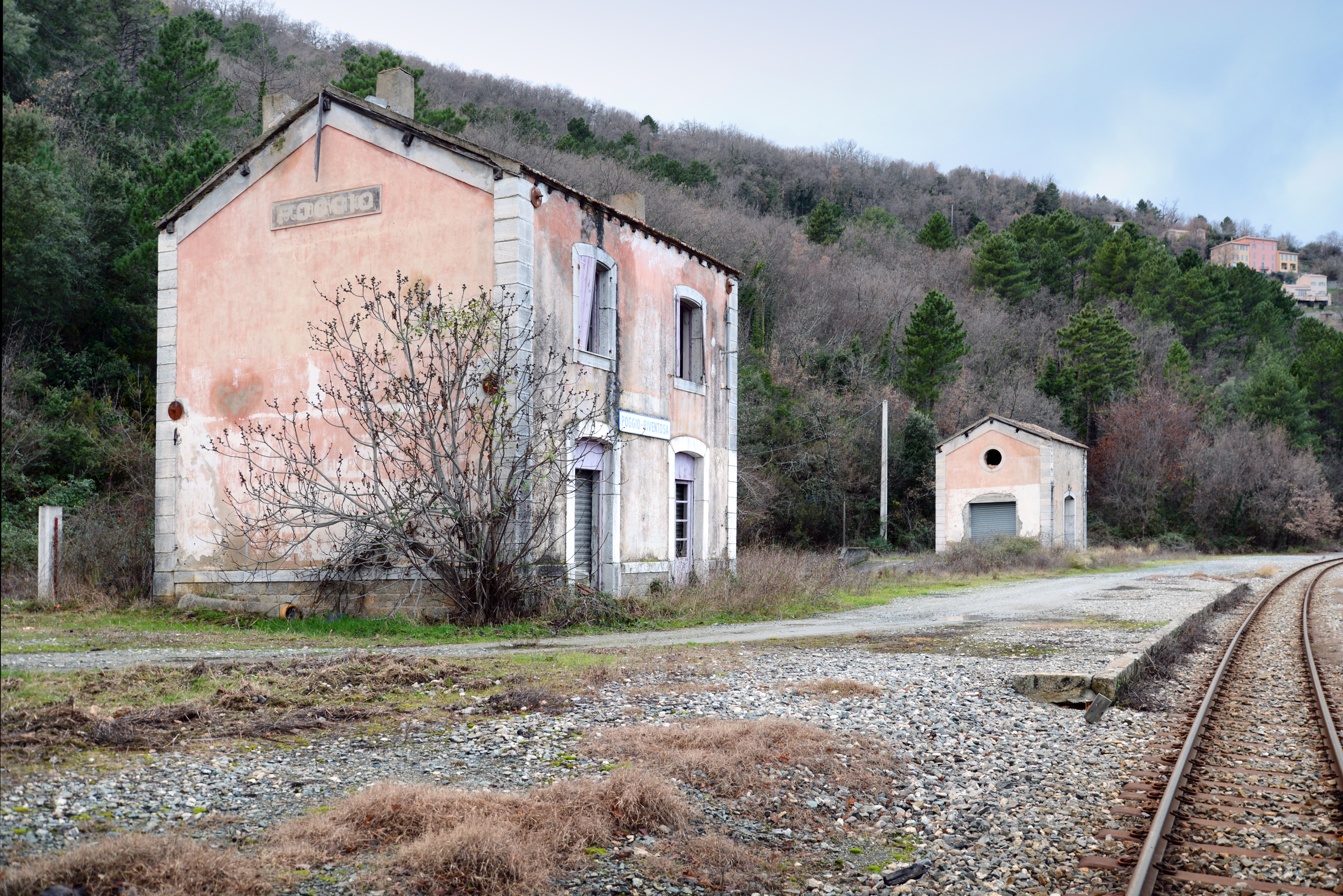 Poggio-di-Venaco, Centre Corse - Ancienne gare de Poggio-Riventosa